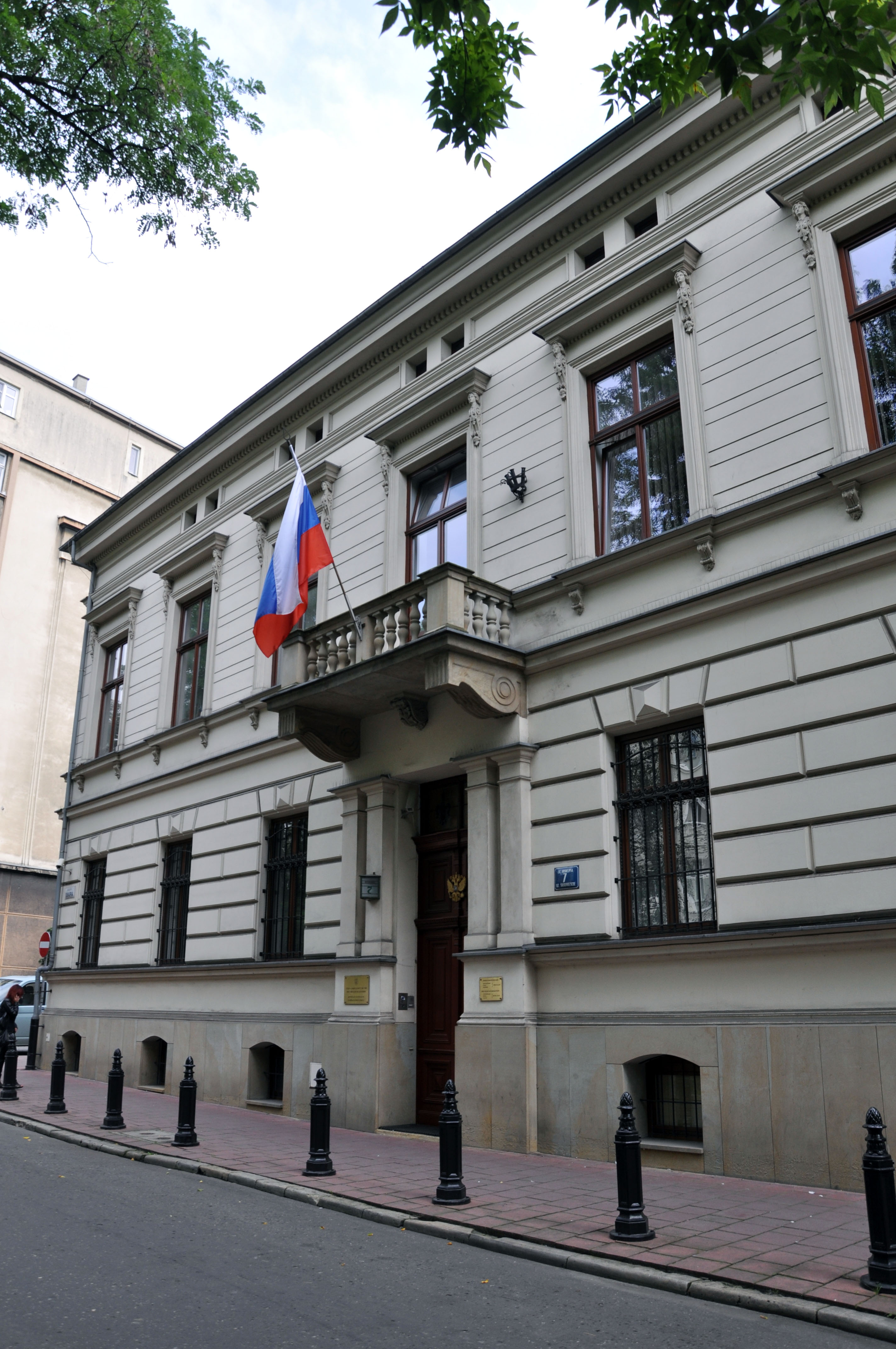 Zabytkowy dom. Kraków, ul. Biskupia 7